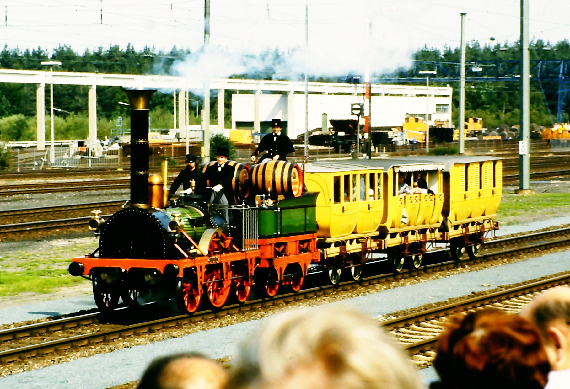 Nachbau des ersten deutschen Zuges bei der Jubiläumsparade 150 Jahre deutsche Eisenbahn in Nürnberg